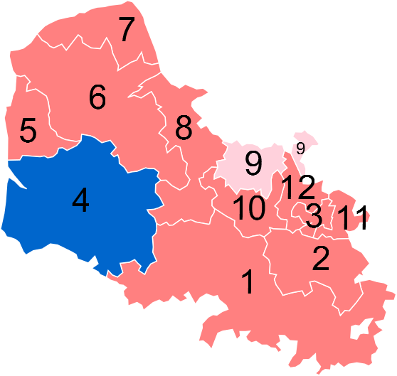 Résultats des élections législatives du Pas-de-Calais en 2012